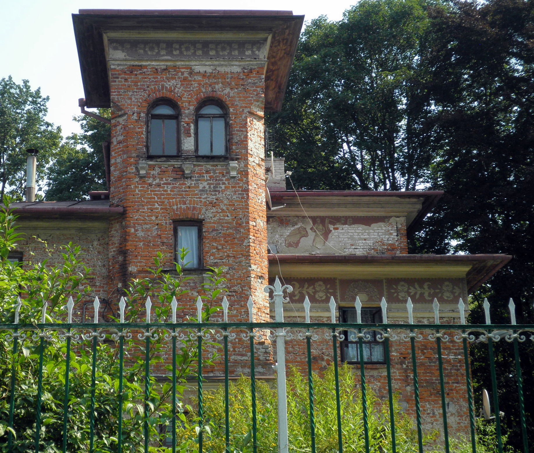 Willa "Marzanna" przy ul. Partyzantów 8 w Nałęczowie